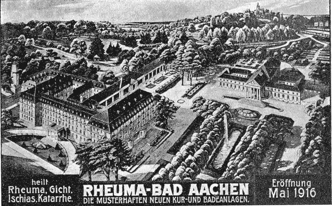 Reklamekarte zur Eröffnung des Quellenhofs 1916